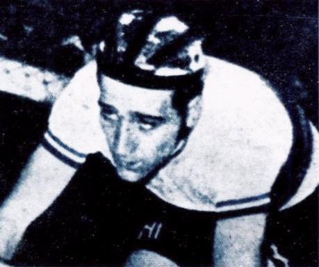 Roger Rivière, 'Sprint 73, Panini figurina n°206.